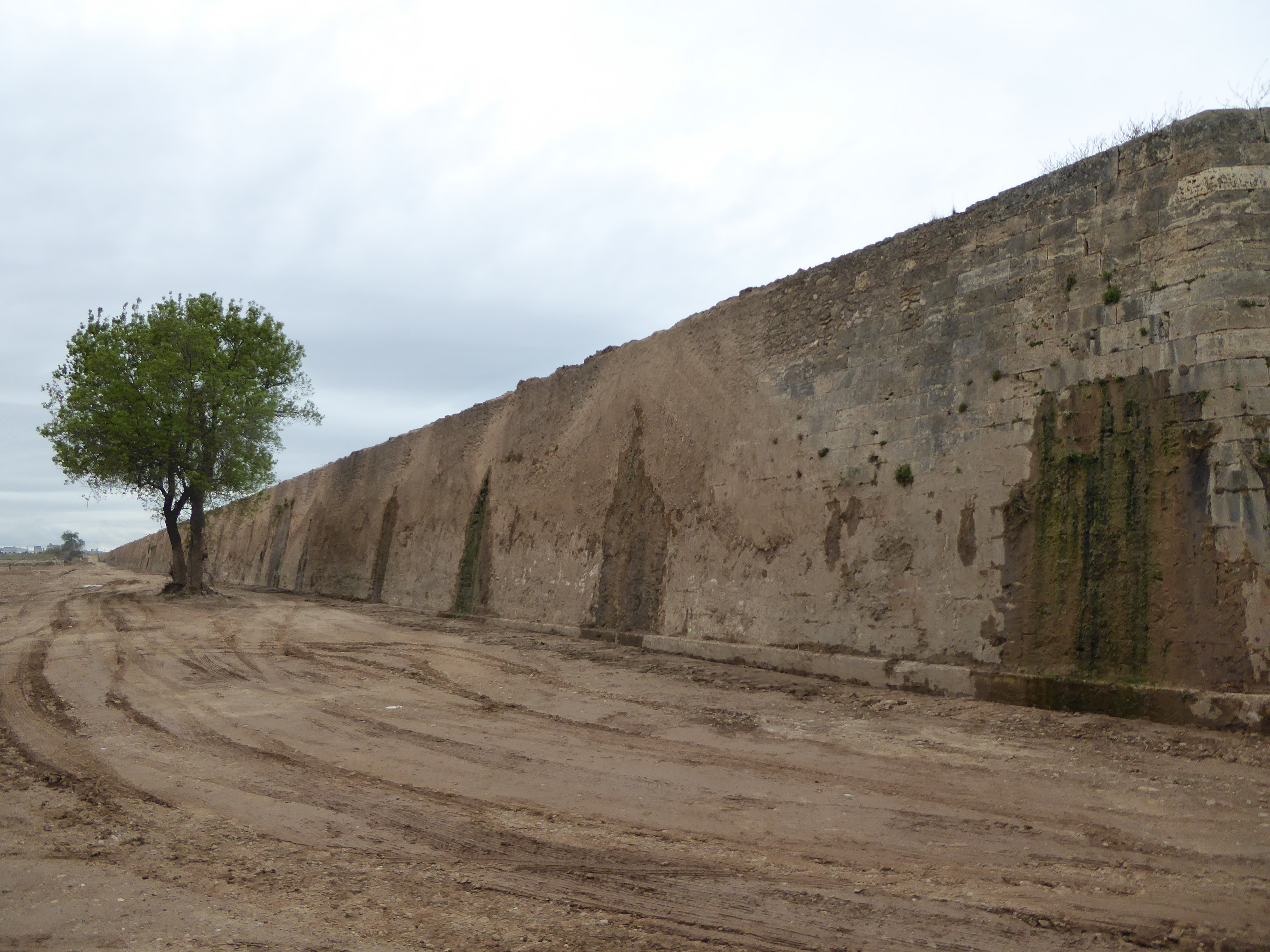 Grisén